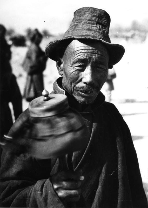 Lhasa, Tibeter mit Gebetsmühle